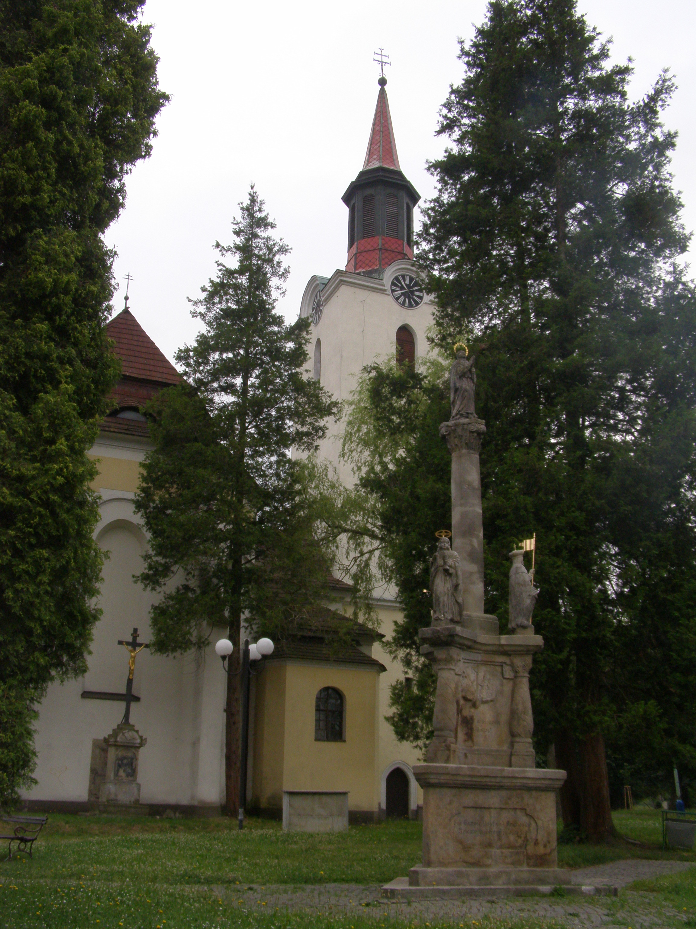 Česky: Cvikov, kostel sv. Alžběty Uherské a mariánský sloup v Sadu 5. května